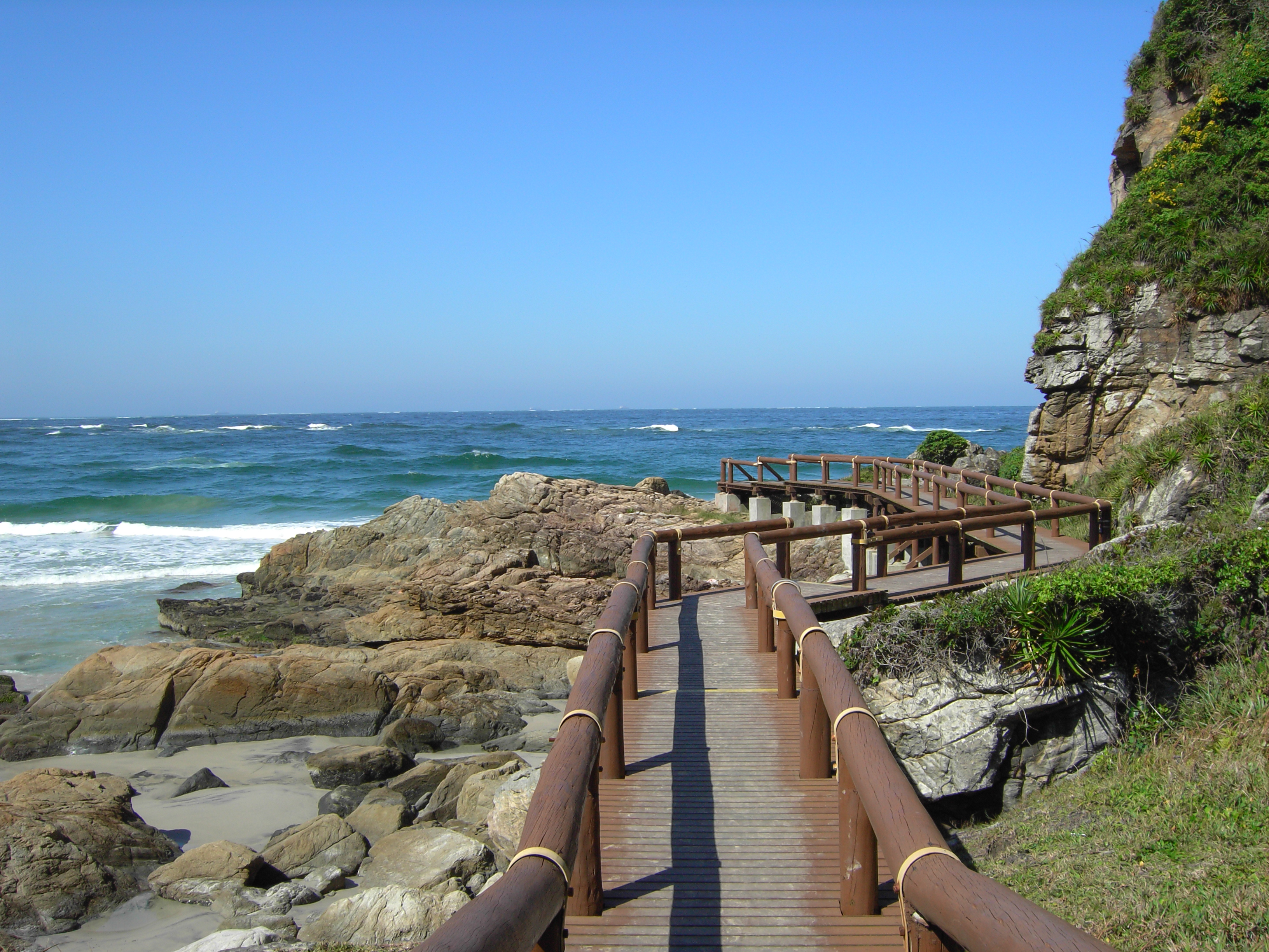 Gruta das Encantadas, Ilha do Mel, Paranaguá-PR